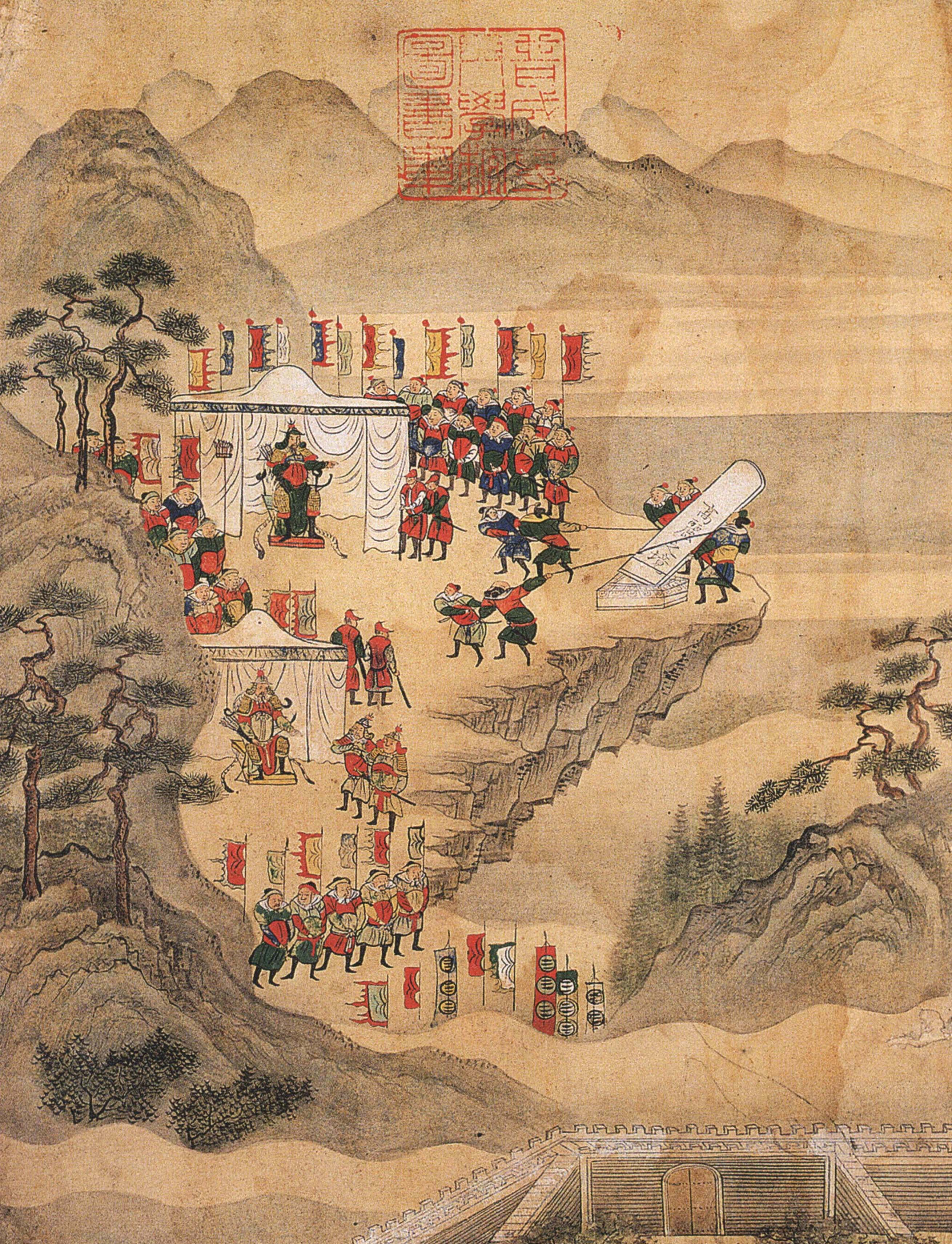 북관유적도첩(北關遺蹟圖帖)-척경입비도(拓境立碑圖)